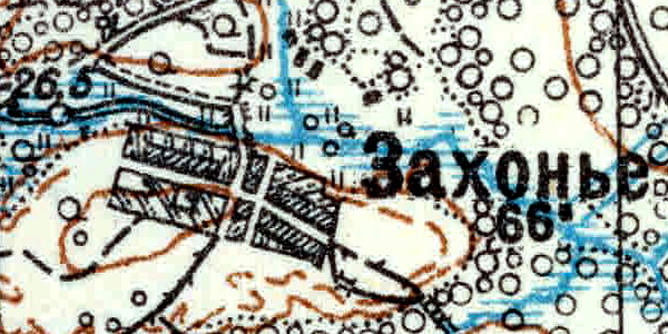 Топографическая карта Ленинградской области, квадрат VIc-27 (Залустижье), деревня Захонье